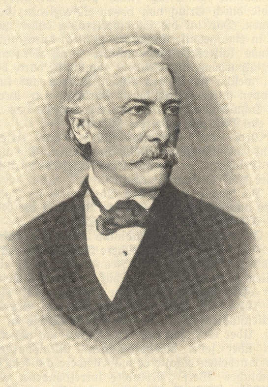 Josef Beck von Mannagetta, právník, historik a politik